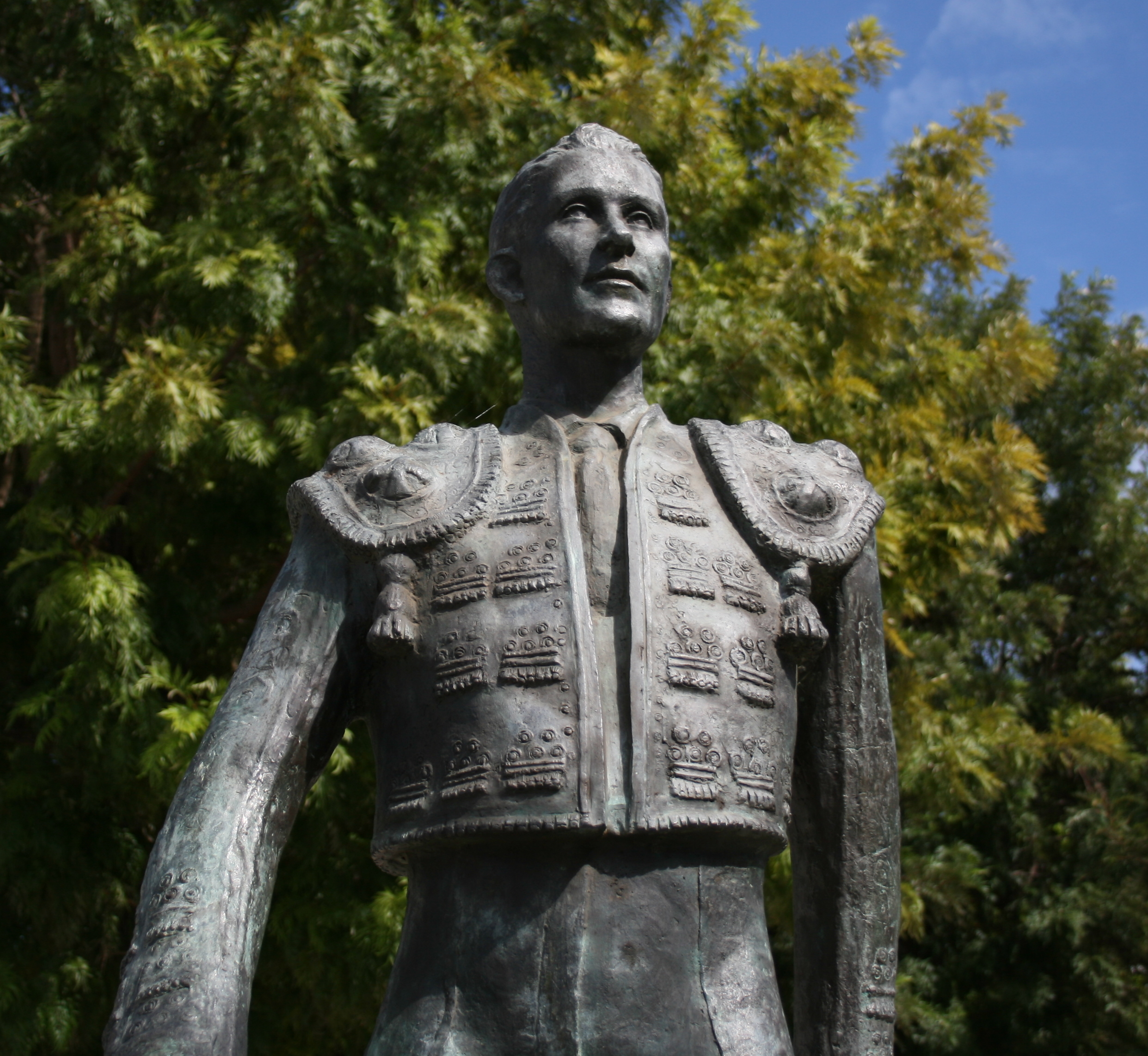 Estátua do toureiro Manuel dos Santos